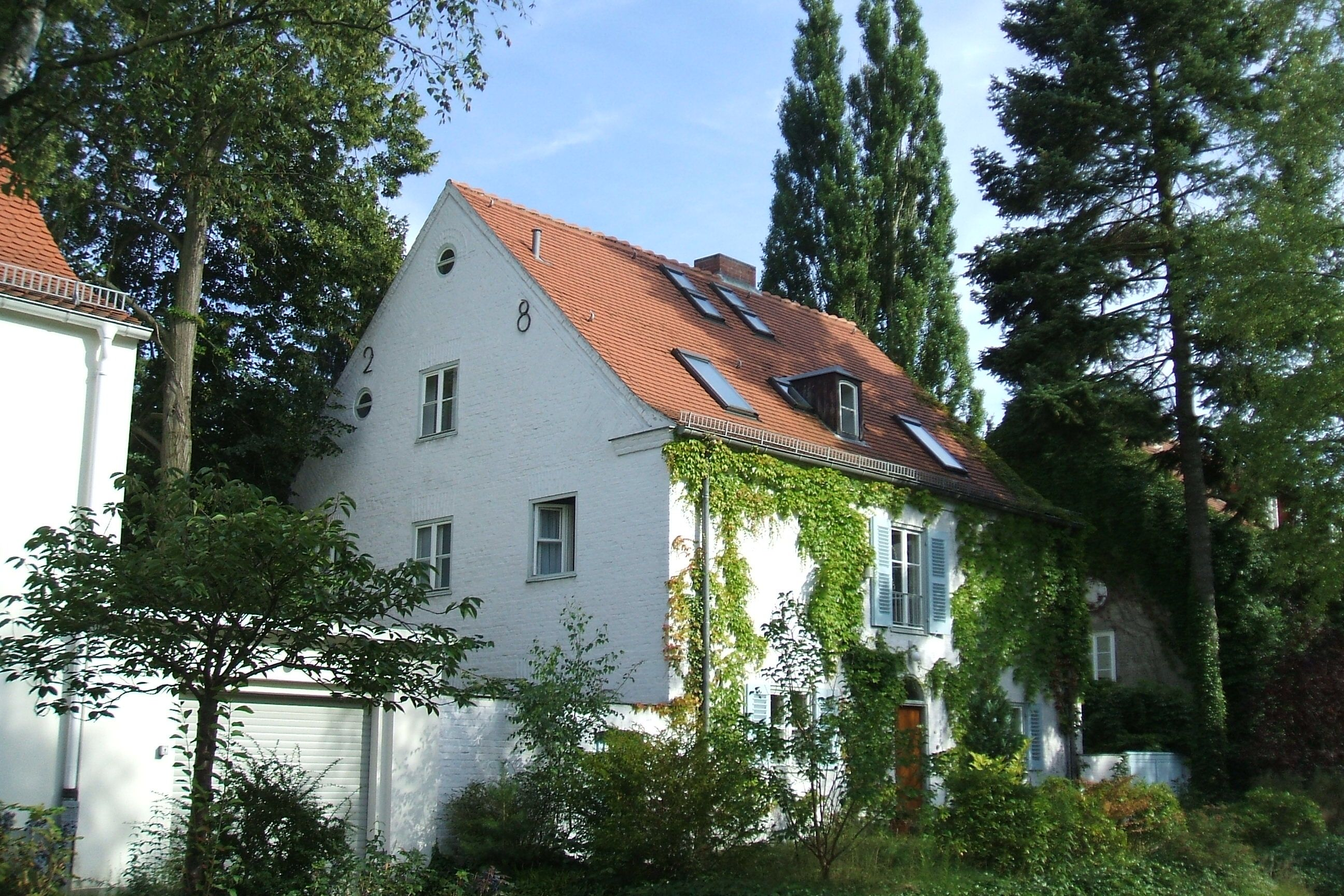 Berlin, Zehlendorf, ein Haus Am Fischtal in Berlin Zehlendorf. Erbaut 1928 von Paul Schmitthenner, ca. 930 m³